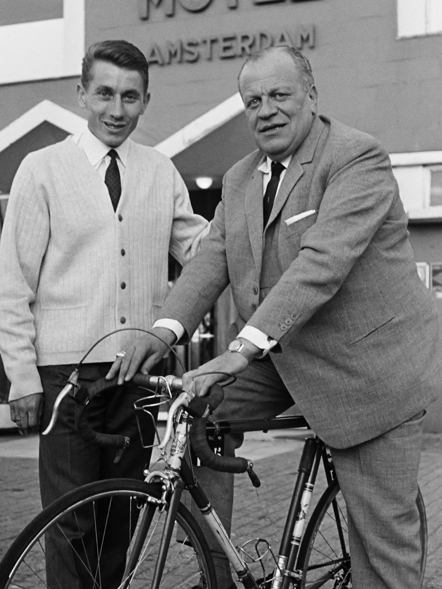 Ronde van Nederland, rondebaas Kurt Vyth op de fiets met naast hem Anquetil 11 mei 1965